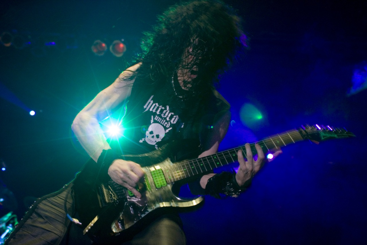 Trey Azagthoth of Morbid Angel Live @ Santana Hall - 08/03/2009 - São Paulo, Brasil É proibida a cópia ou reprodução deste material sem a autorização do autor. Por favor, não publique nada daqui sem o devido crédito. Fotógrafo: Alexandre Cardoso